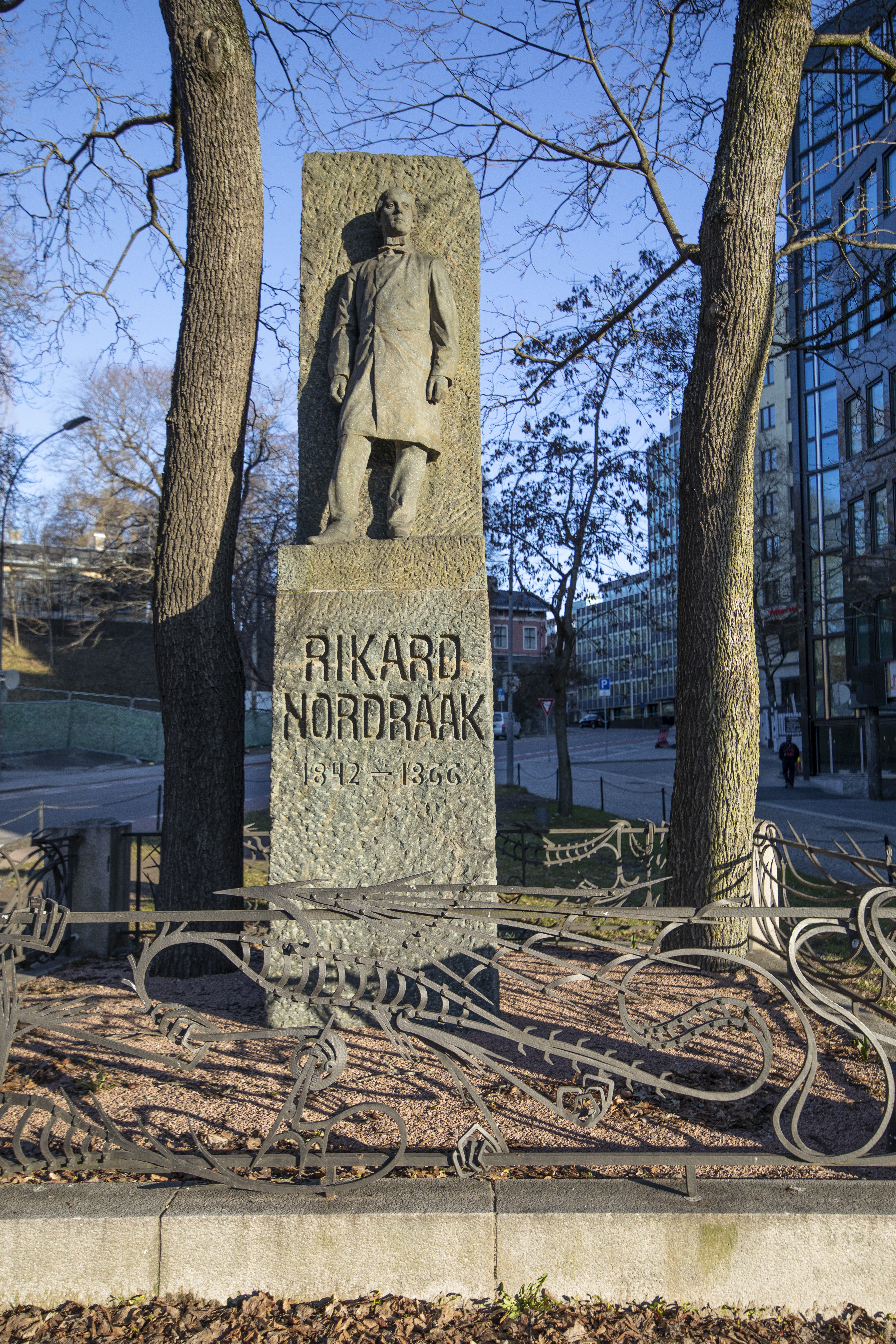 Gustav Vigeland sin skulptur av Rikard Nordraak, reist i Kristiania i 1911.